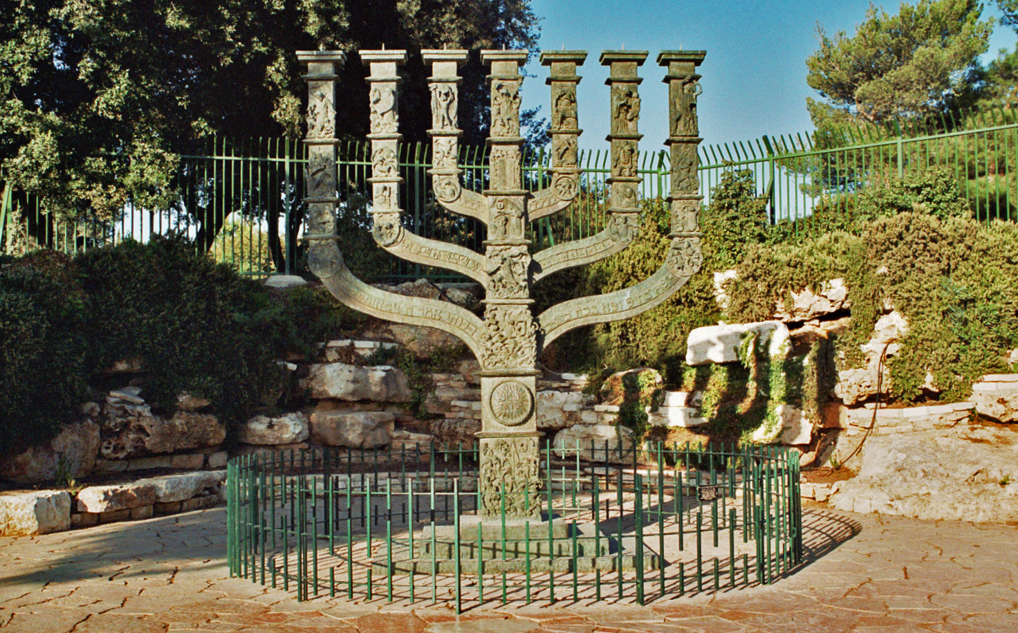 Die Menorah vor der Knesseth